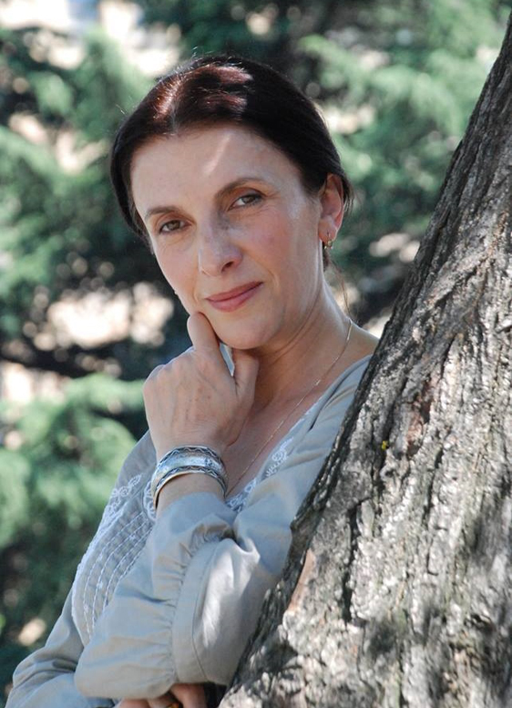 მარიამ წიკლაური-2013